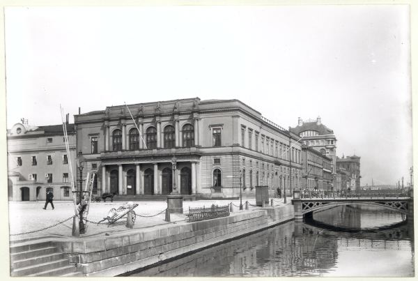 gata - avbildad Östra Hamngatan [parti av västra sidan mot norr] plats - avbildad Gustaf Adolfs Torg byggnad - avbildad Börsen Bron över Östra Hamnkanalen är Köpmansgatubron.